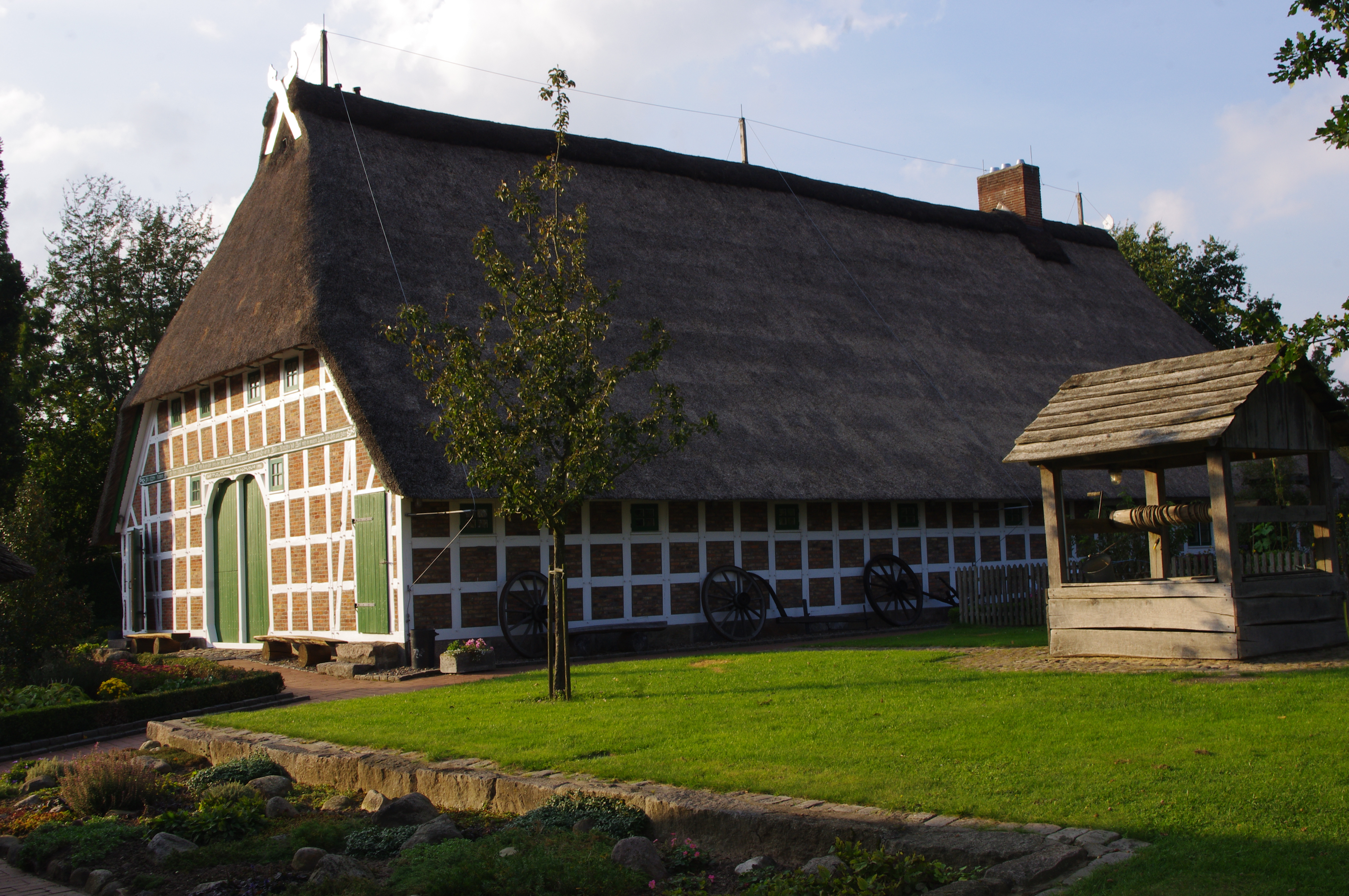 Auf diesem Bild sieht man das Haupthaus das aud der alten Hofstelle " Dem Beekhoff" in Beckdorf steht.